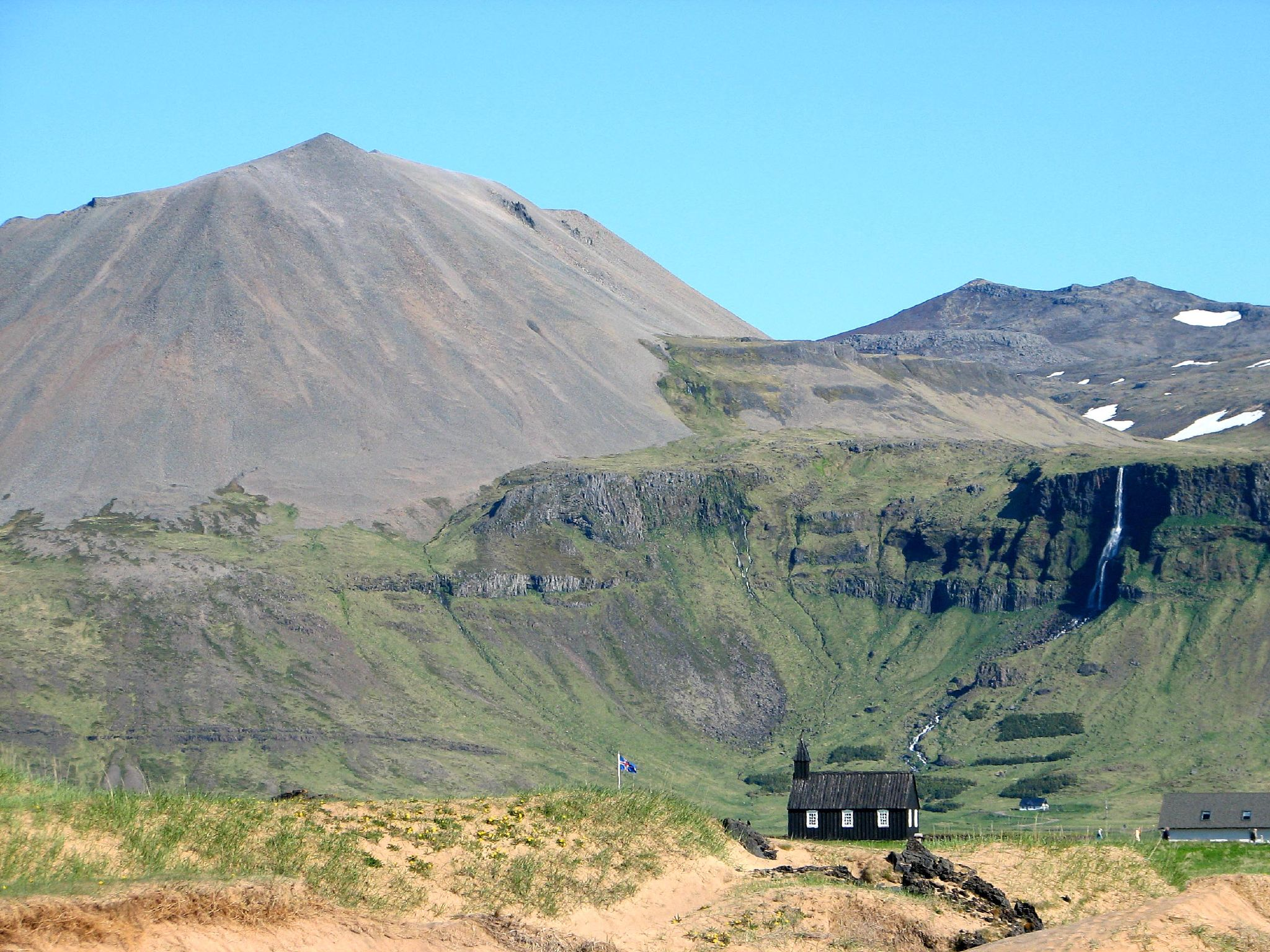 Snaefellsness Peninsula S 04